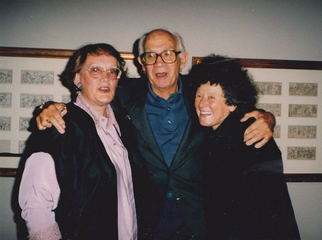 Recital Barradas en el Museo Municipal de Bellas Artes Juan Manuel Blanes. Montevideo, 30 de marzo de 1995.